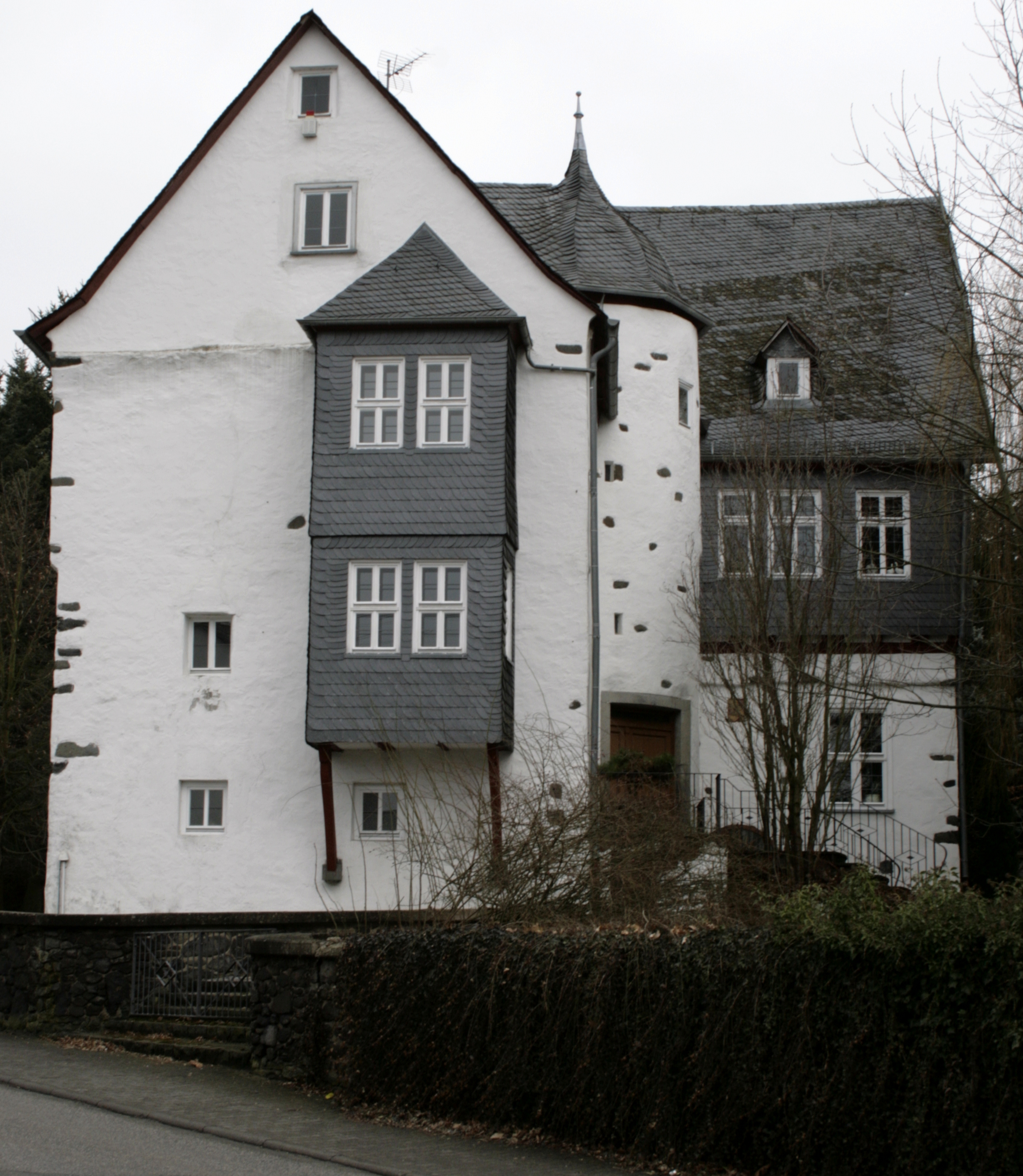 Hofhaus in Langendernbach, Deutschland, aus Südwesten gesehen